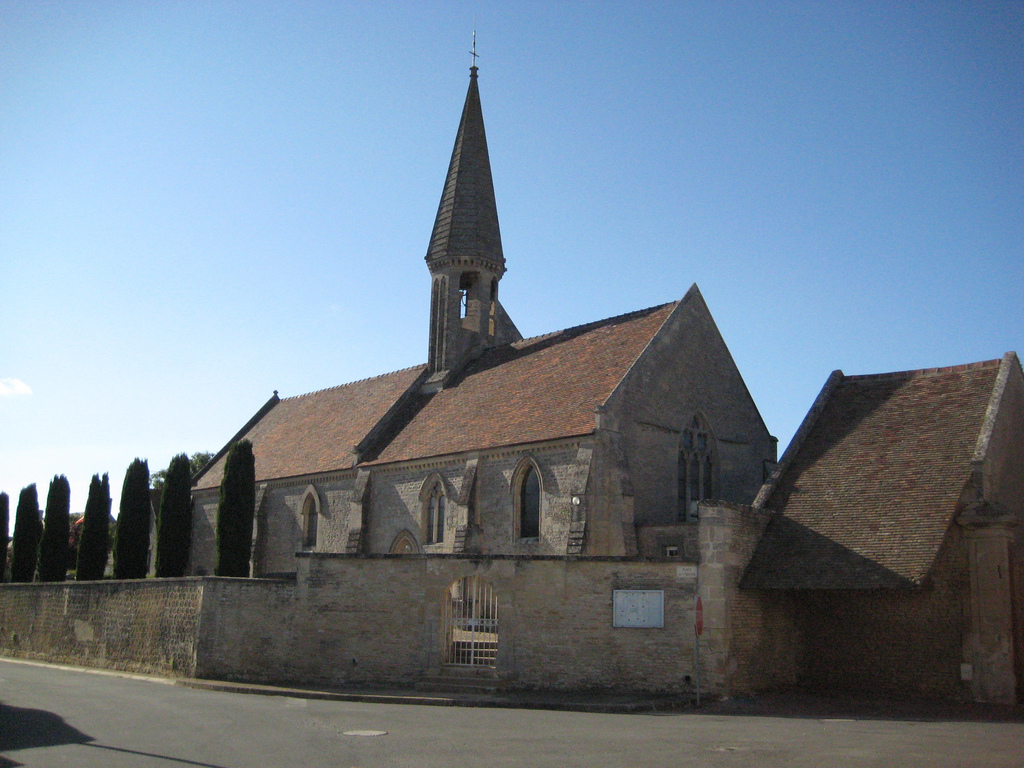 Église de Villons-les-Buissons (Calvados, France)